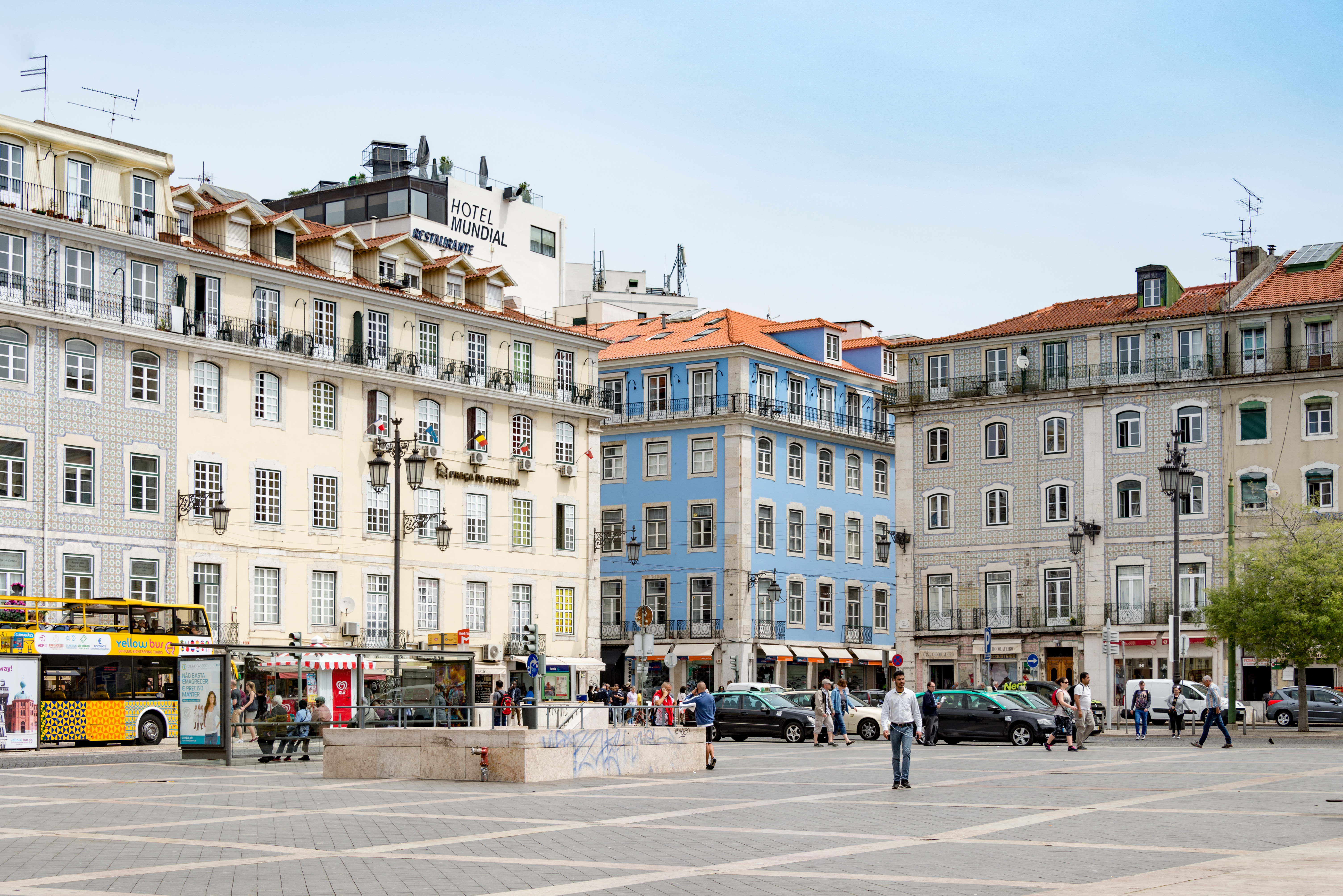 33852-Lisbon